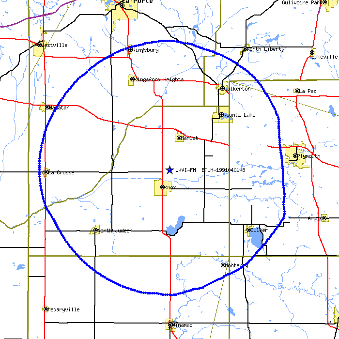 WKVI, 99.3 FM map